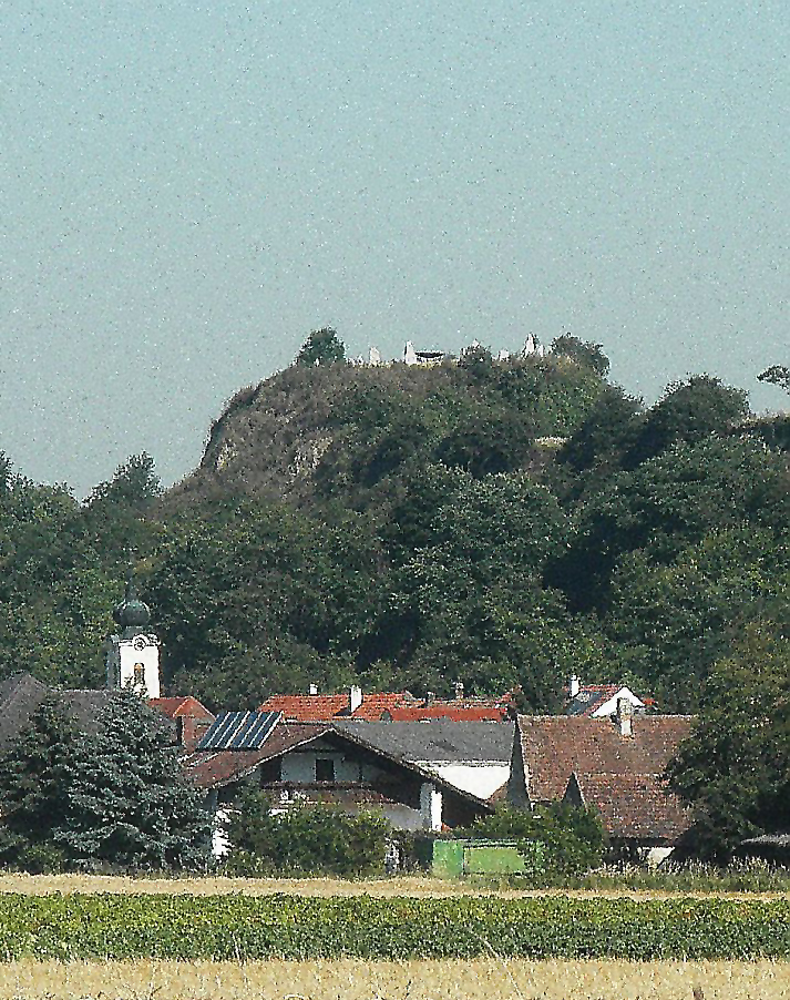 Der Leeberg Pettendorf in der Marktgemeinde Hausleiten im Bezirk Korneuburg Teil des Erlebnisweges "Kultur verbindet". Blick von Gaisruck zum Tumulus.